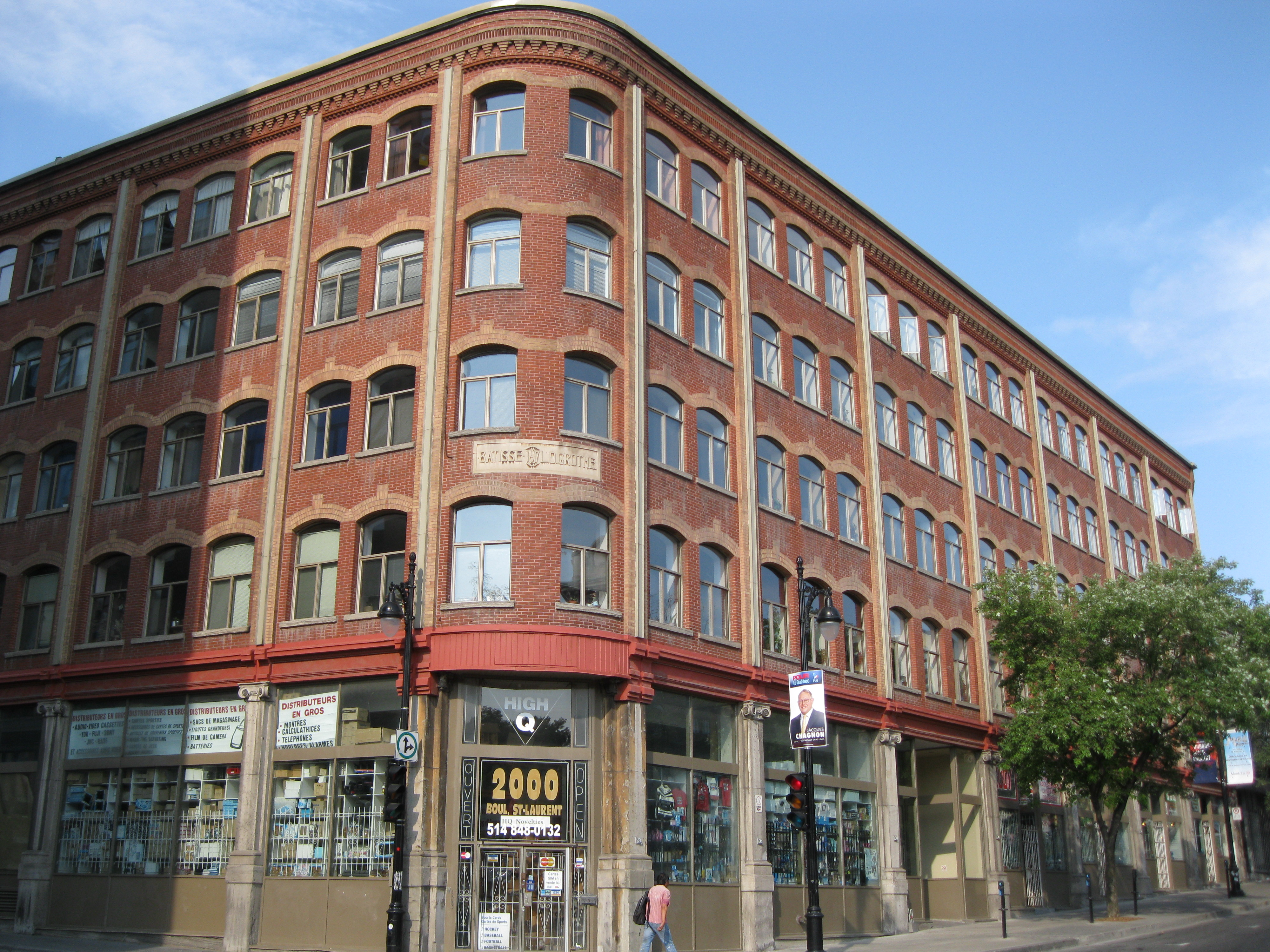 Manufacture Louis-Ovide-Grothé, 2000-2012, boulevard Saint-Laurent, Montréal